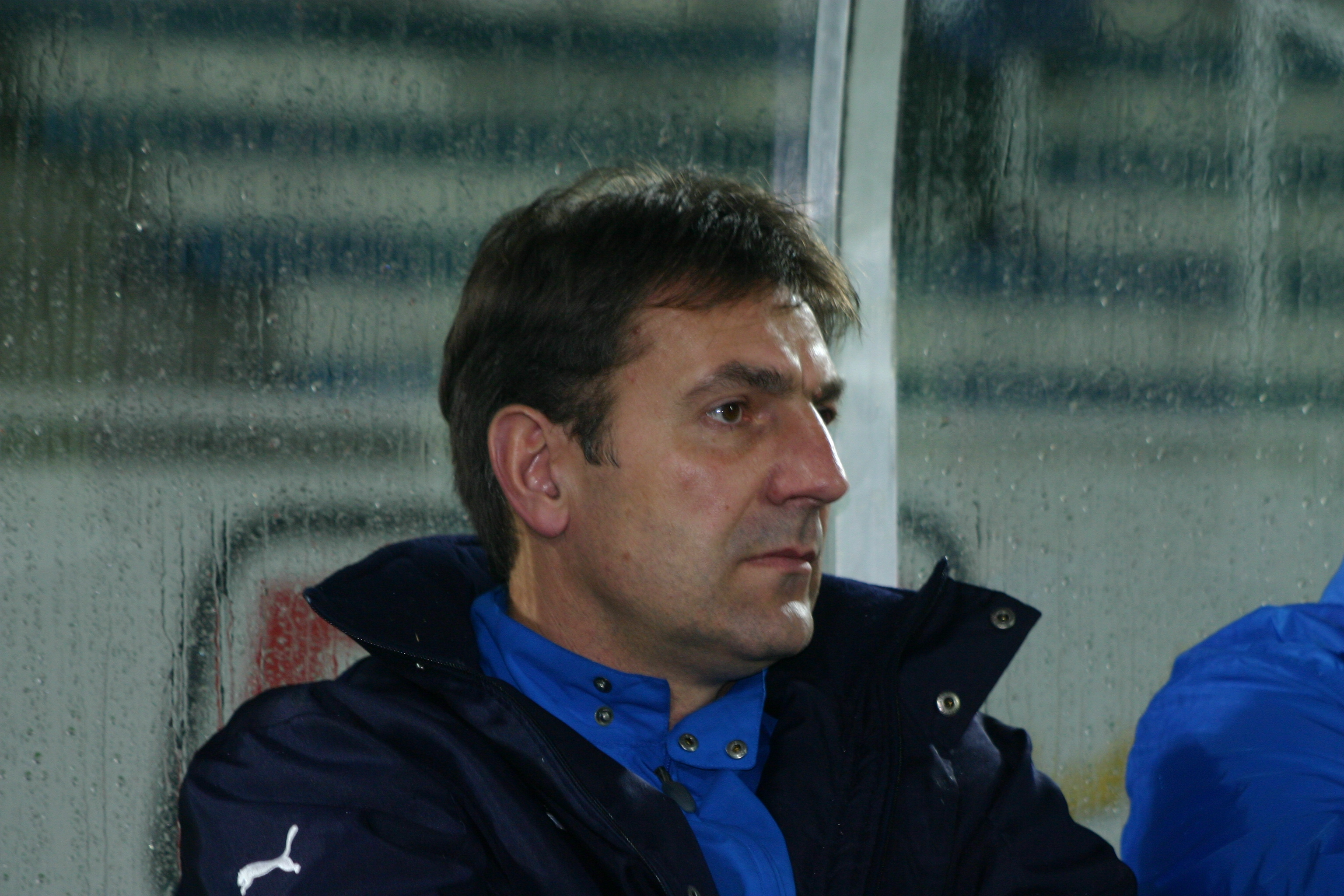 Andrzej Lesiak – Trainer 1. FC Vöcklabruck